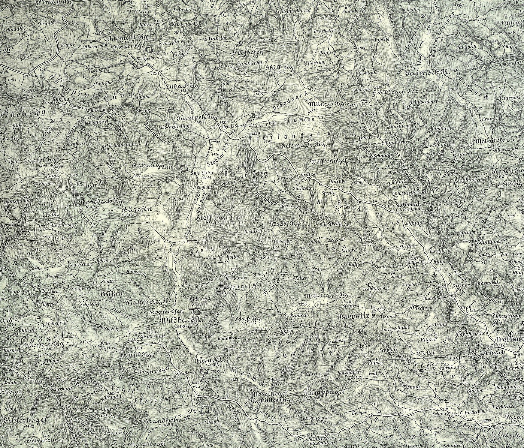 Hebalm in der Mitte der Koralpe und deren Umfeld, Verkehrsbeziehungen usw.